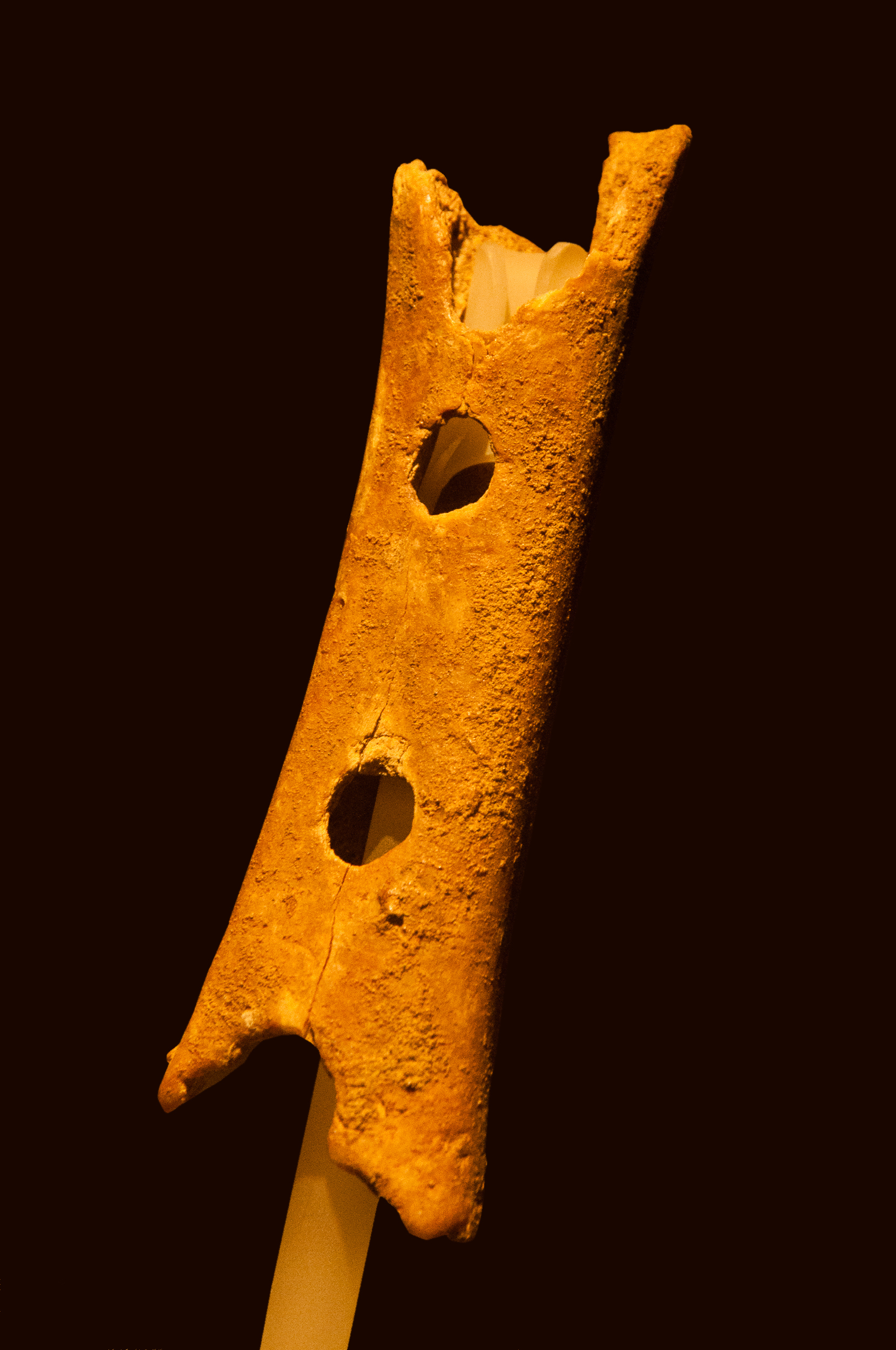 Das Original der "Divje Babe flute", ausgestellt im slowenischen Nationalmuseum in Ljubljana.